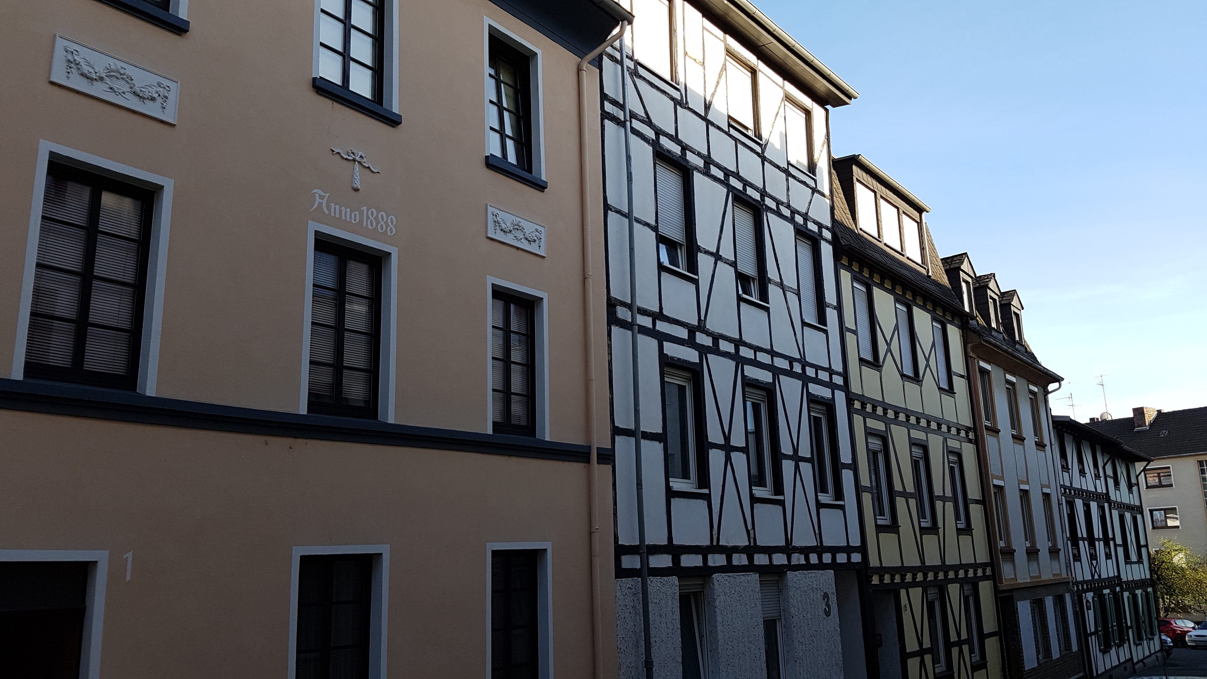 Denkmal